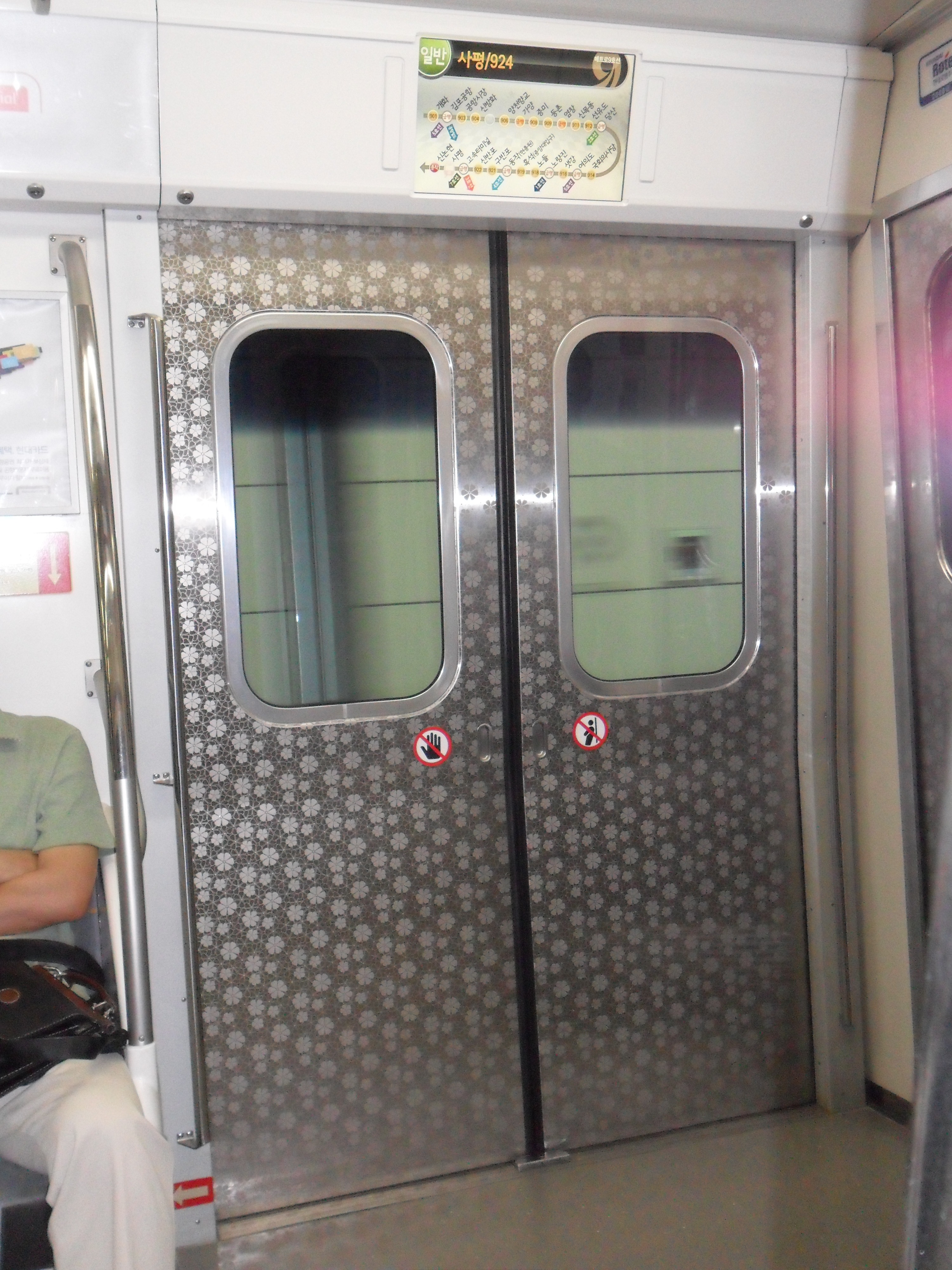 9호선 전동차 출입문 및 상단 LCD 모니터